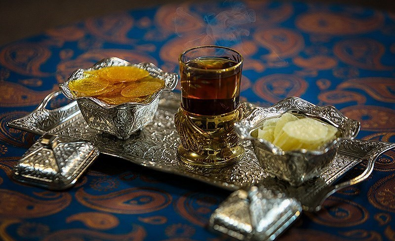 پولکی سوغات اصفهان